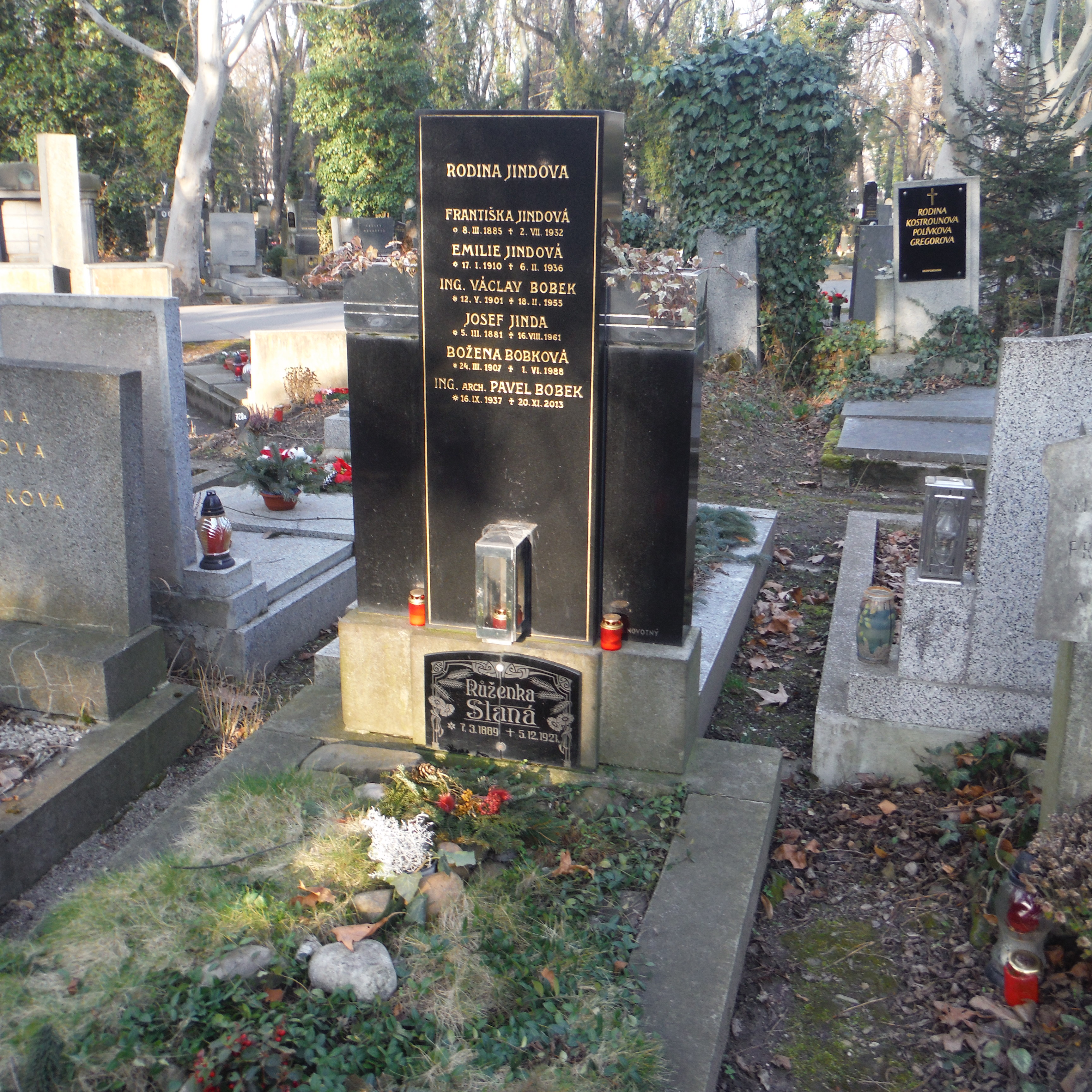 hrob